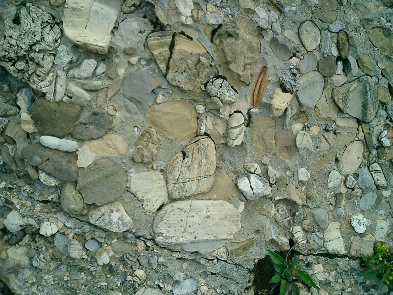 Konglomerat (Nagelfluh, Sedimentgestein) am Speer in den Schweizer Voralpen